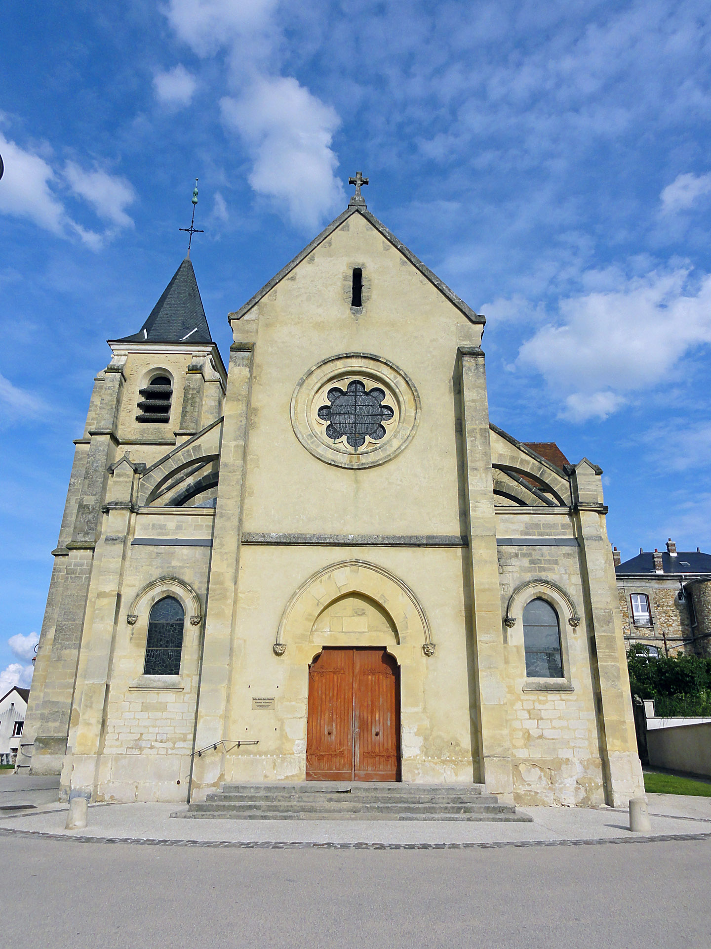 Façade de l'église Sainte-Madeleine de Domont, Val-d'Oise, France.